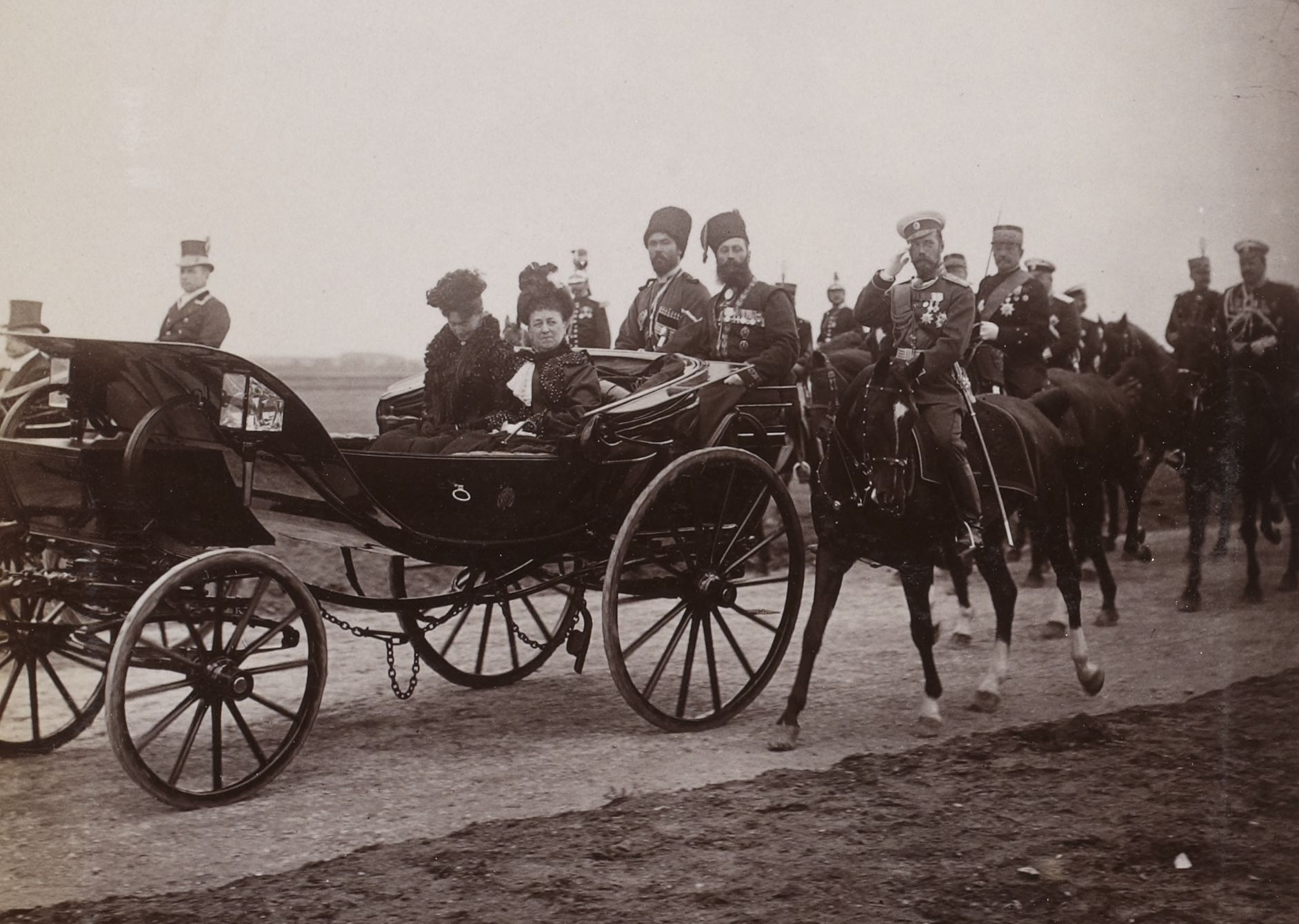 Collection Jules Beau. Photographie sportive : T. 14. Année 1901 / Jules Beau : F. 44. Tzar à la revue de Bétheny